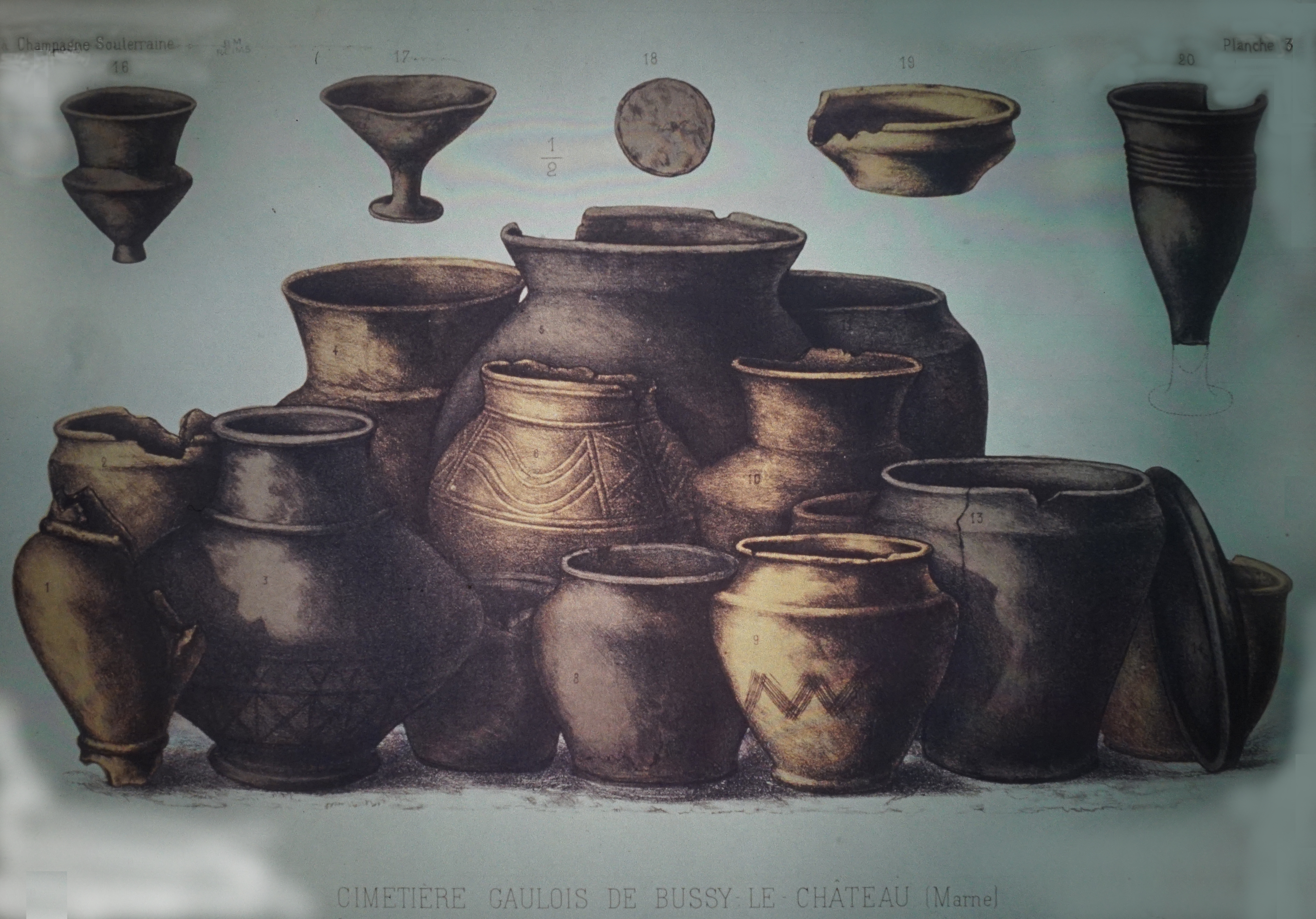 dessin d'objets trouvés lors de fouilles archéologiques.